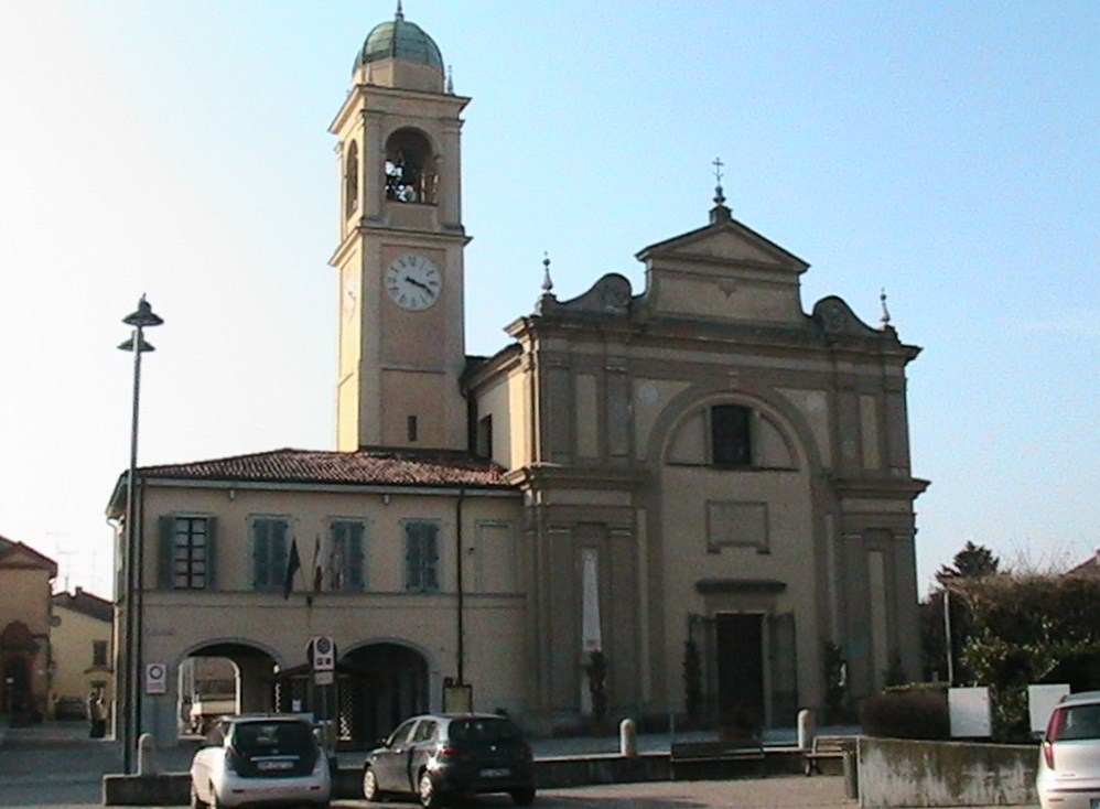 Torre de’ Picenardi - Chiesa Parrocchiale di Sant’Ambrogio